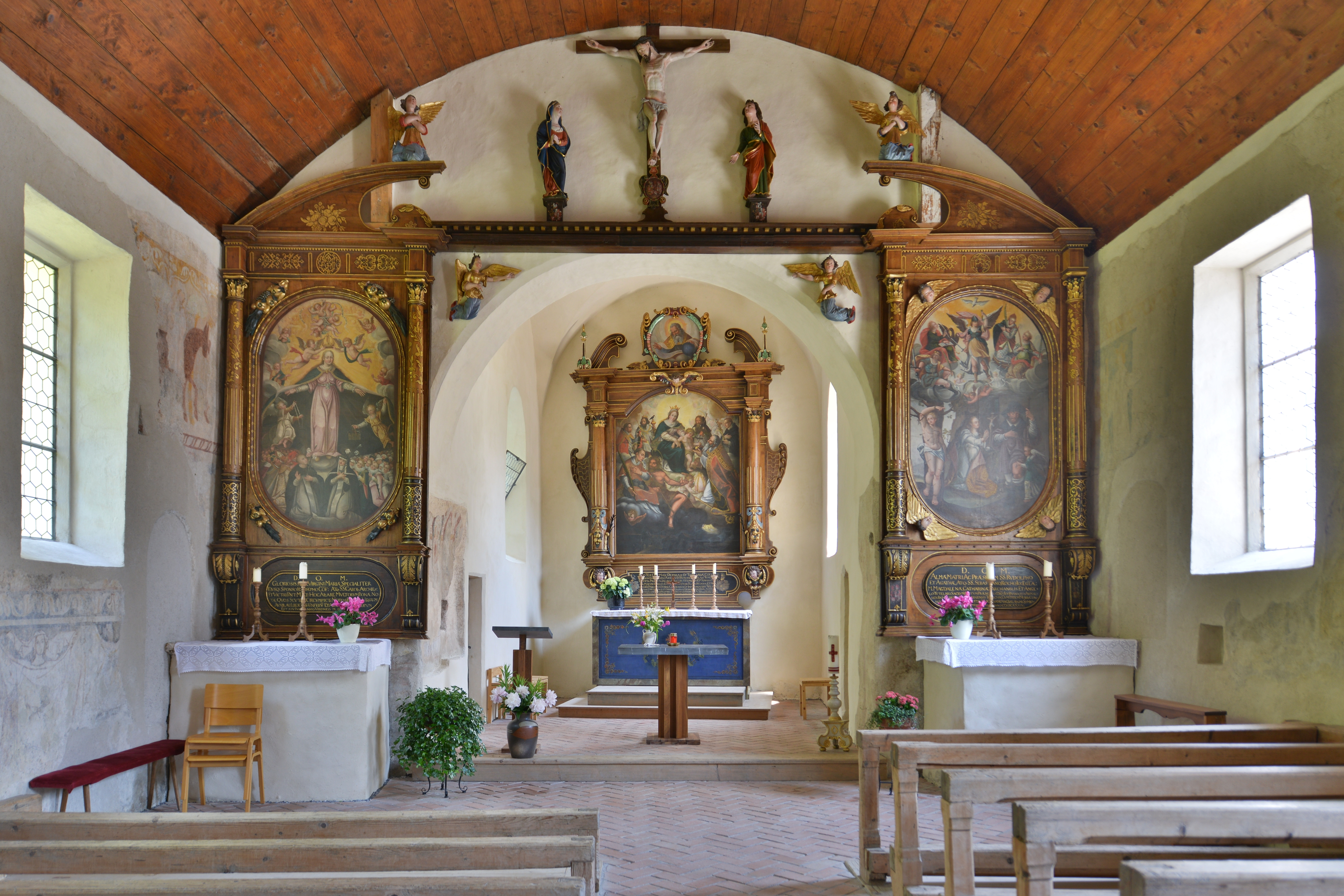 Bludesch, Filialkirche hl. Nikolaus, in Zitz. Urkundlich um 842 "Cise". 1483 Kaplanei. Breiter spätromanischer Bau mit eingezogenem quadratisch barockem Chor unter gemeinsamen Satteldach, Rechteckfenster; Nord-Tur, mit gekoppelten un einfach darüber gestellten Schallöffnungen, vorkragendem Giebelgesims, gemauertem Giebelspitzhelm mit knopfartigen Fialen. Südlich an Langhaus und Chor angebaute Sakristei mit Pultdach von 1629. Im Chor ehemalige Rundapsis durch Ausgrabungen festgestellt, Ummantelung 1629/30.